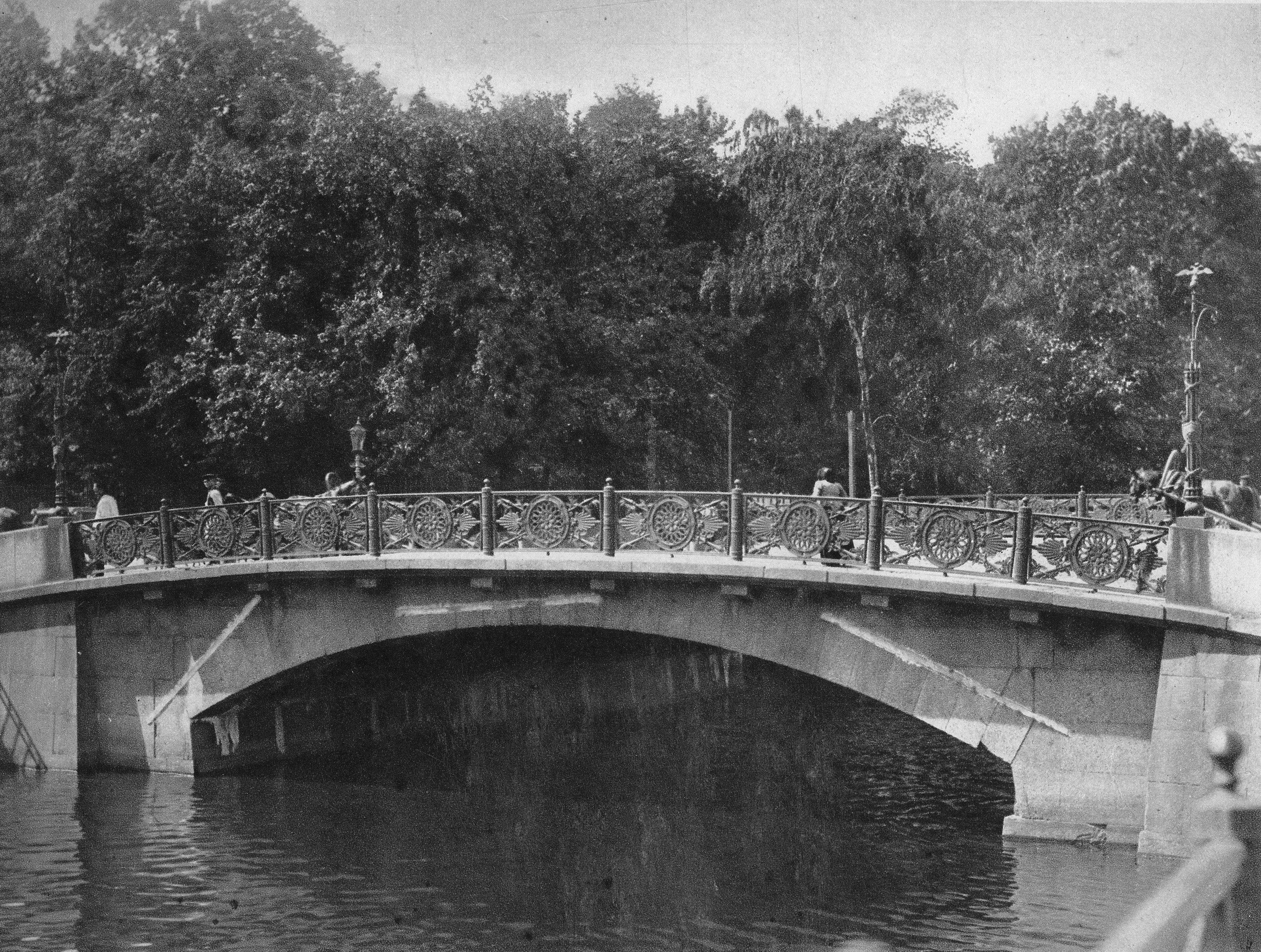 Михайловский мост через р. Мойку до реконструкции 1906-1907 гг.